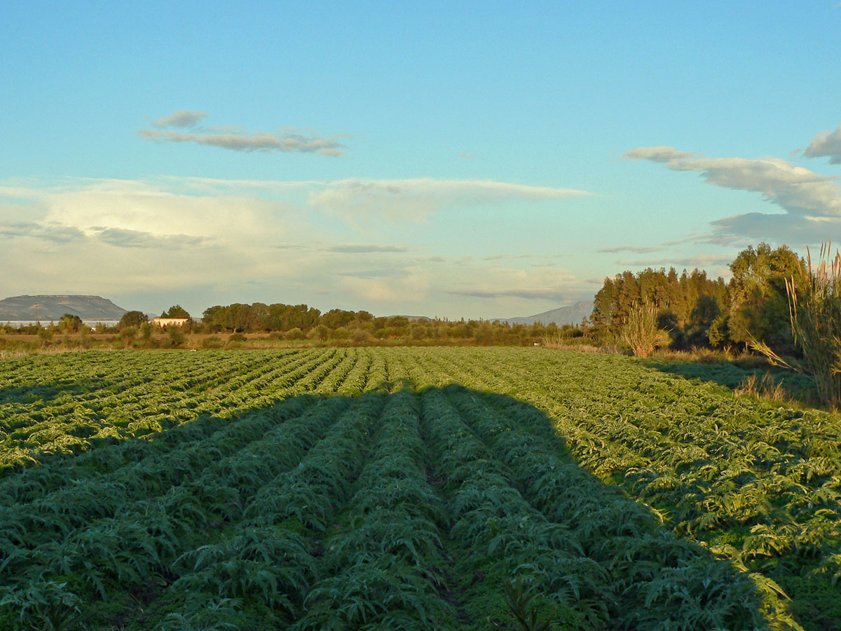 Giba-Villarios. Coltivazione dei carciofi